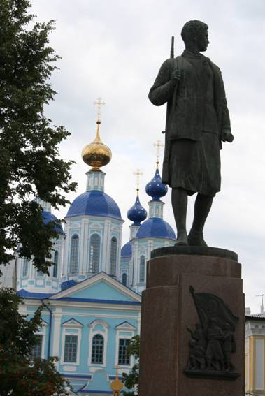 Тамбов, памятник Зое Космодемьянской